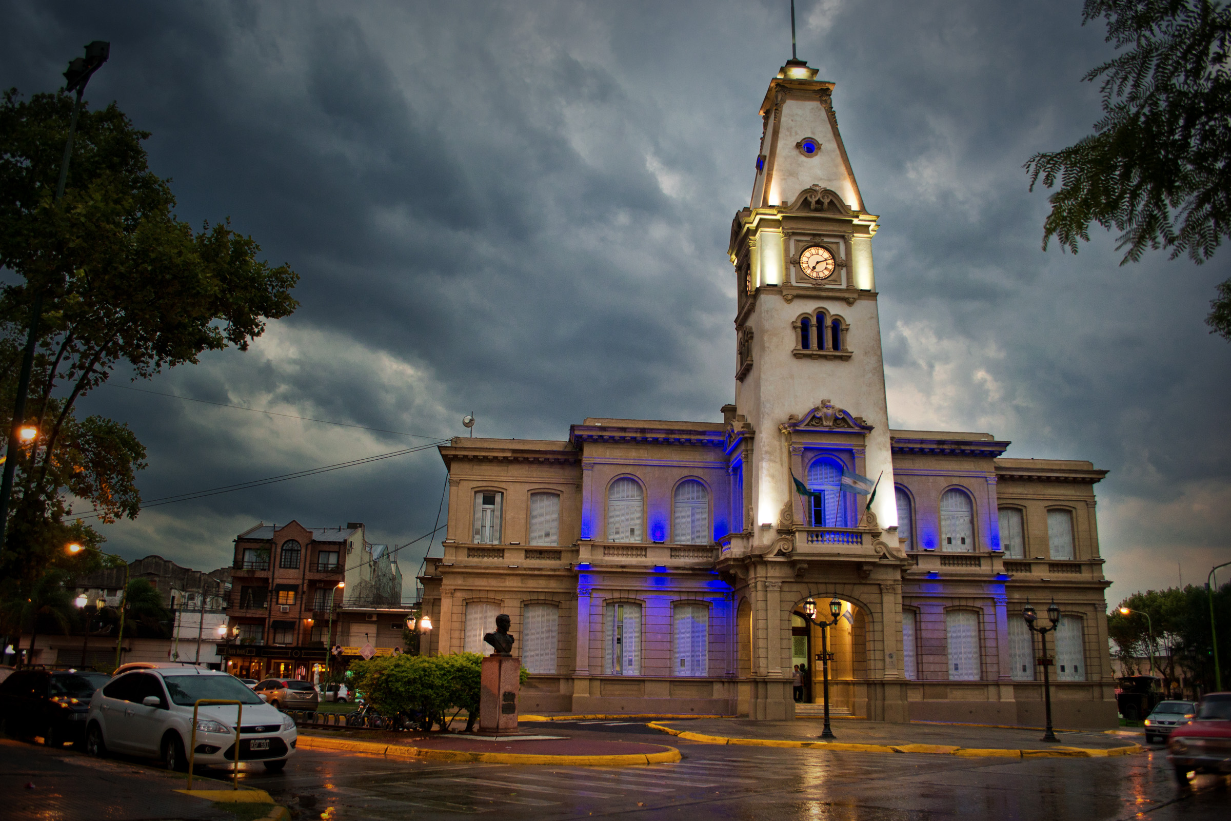 Palacio Municipal de Campana (Macchi & Distasio, 1929-34), provincia de Buenos Aires.